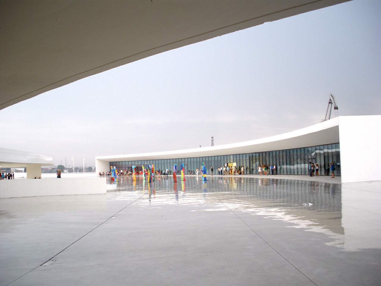 Centro Cultural Internacional Oscar Niemeyer (Avilés, Asturias, España). Edificio de usos múltiples